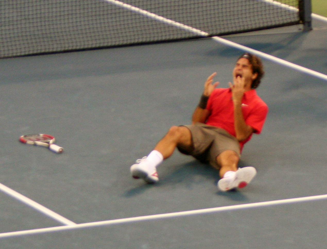 Roger Federer wins the US Open 2008